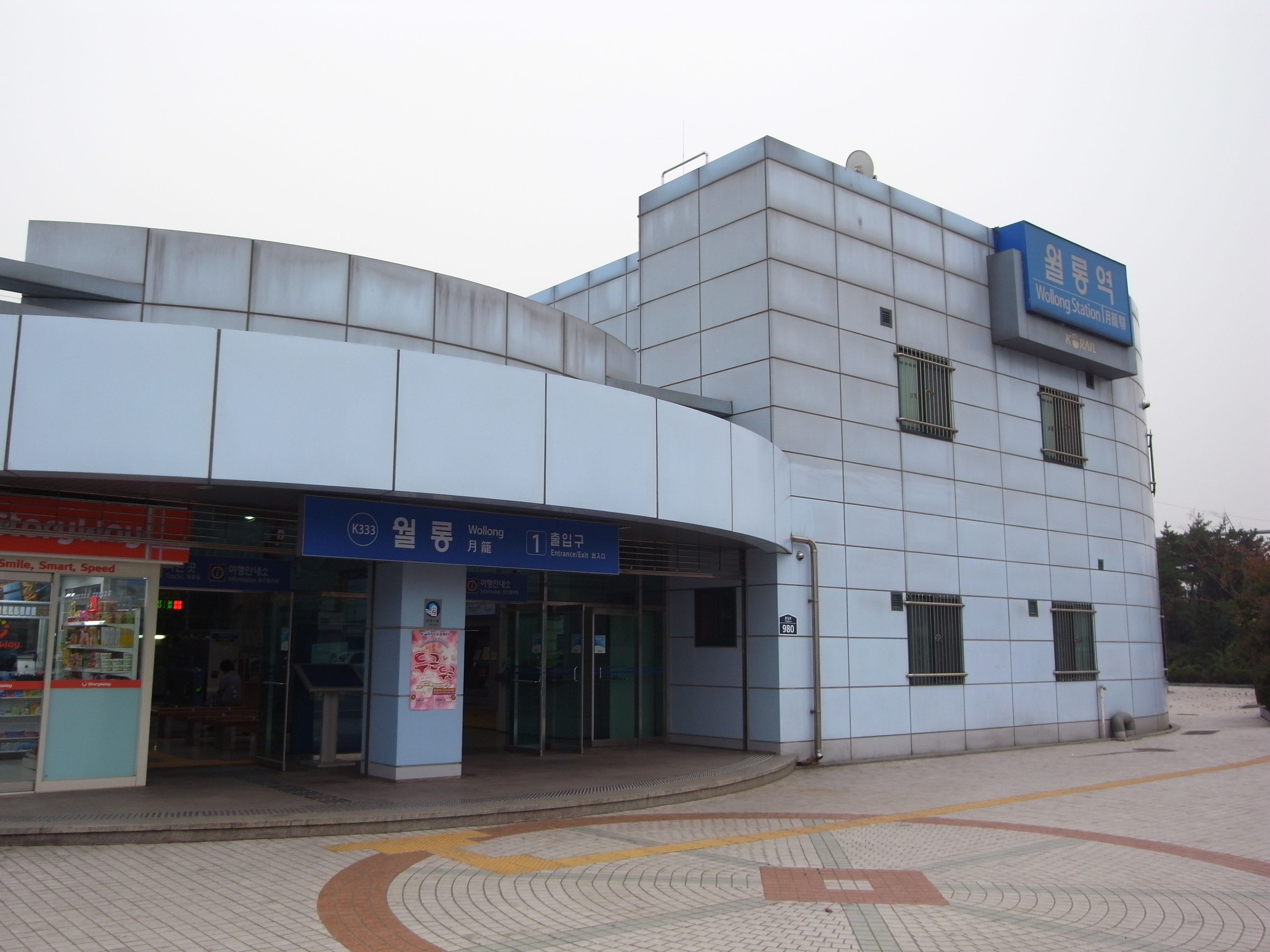 경의선 월롱역